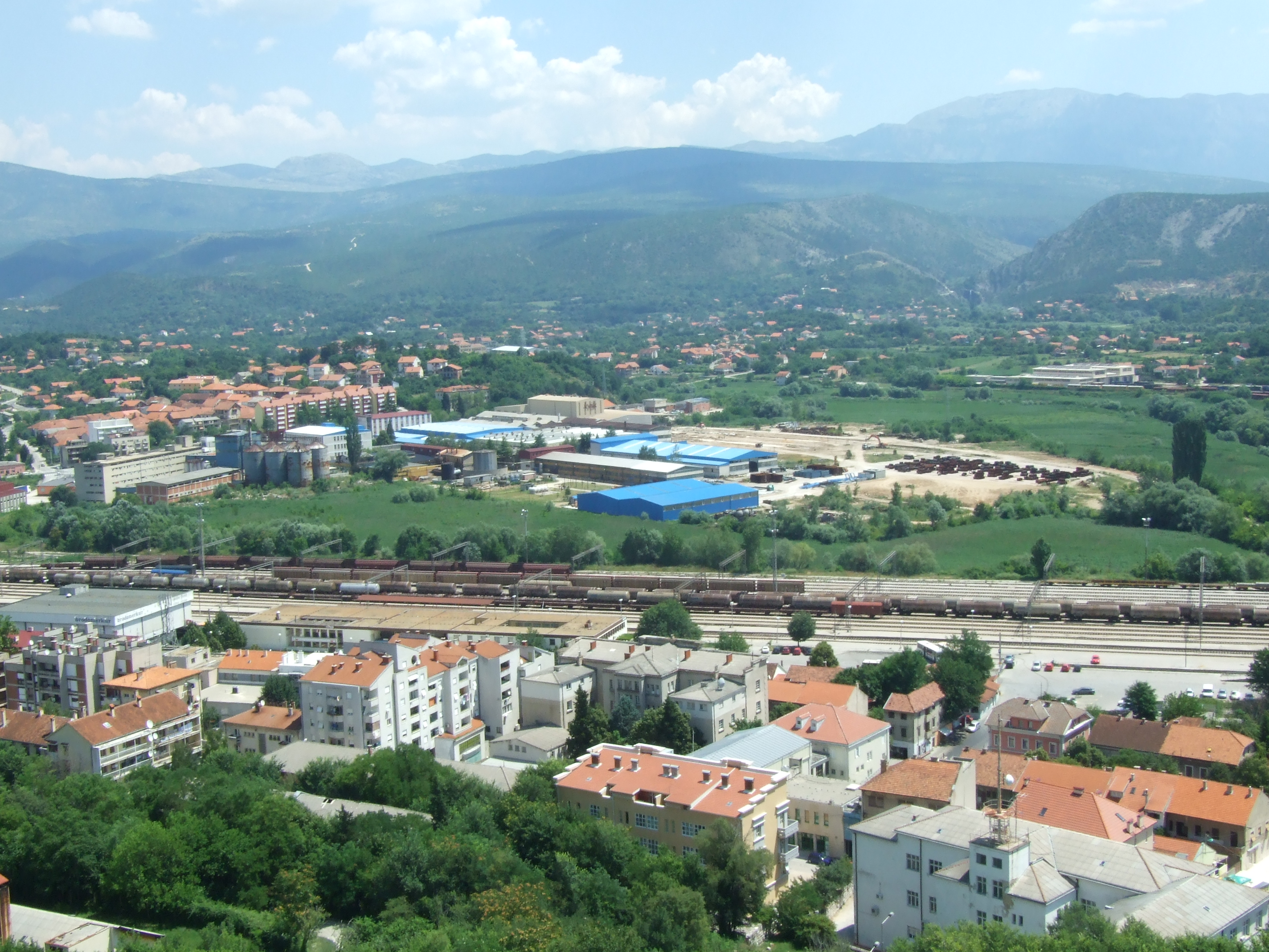 Tvornica TVIK u gradu Kninu. Slikano s Kninske tvrđave, 3. srpnja 2010.